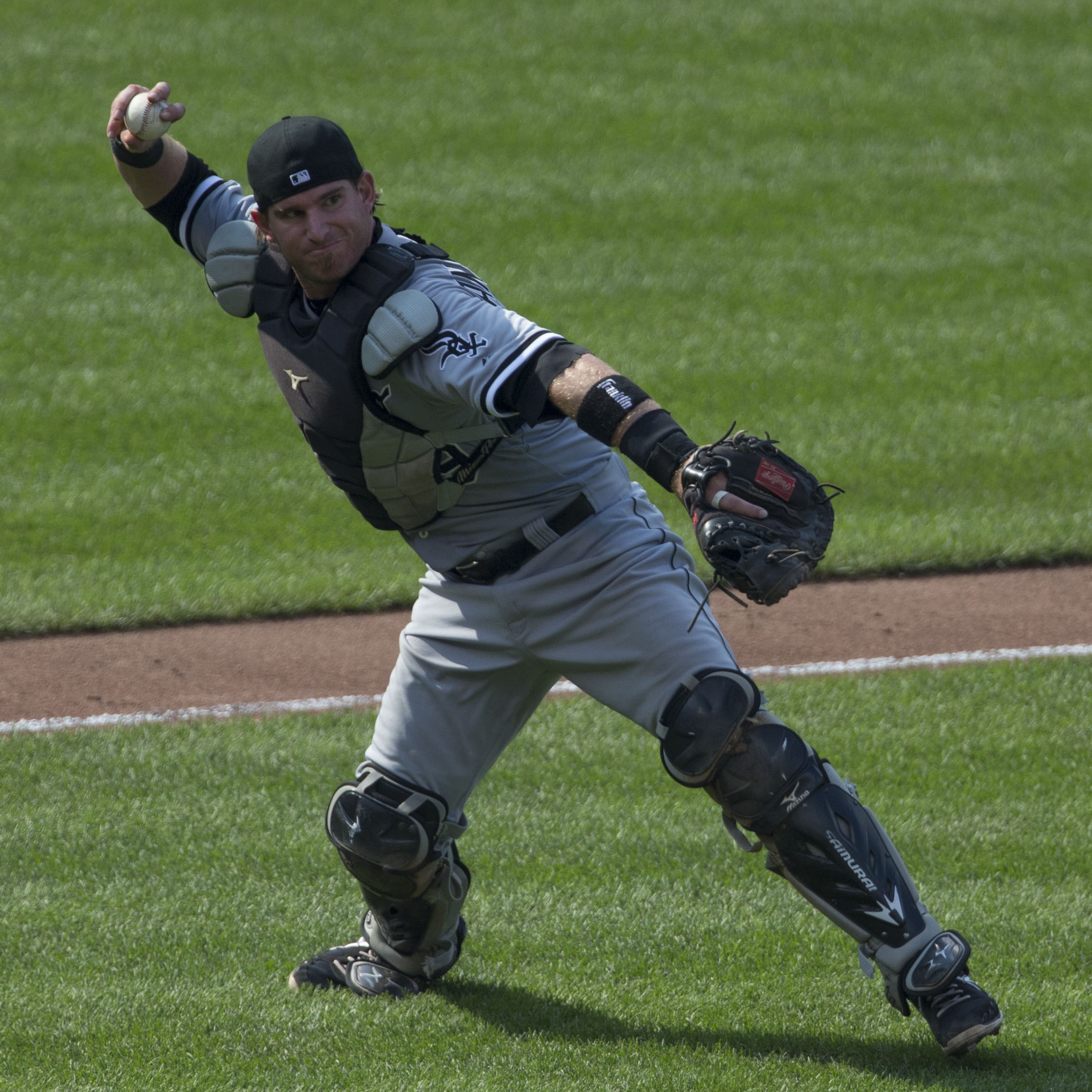 Bryan Anderson